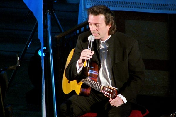 Bildbeschreibung: Steve Hackett bei einem Konzert in Braunschweig 2005 Fotograf/Zeichner: Peter Schütz Datum: 2005-06-15 Sonstiges: Genehmigung liegt mir vor; mit freundlicher Genehmigung von Deutscher Genesis Fanclub "it"